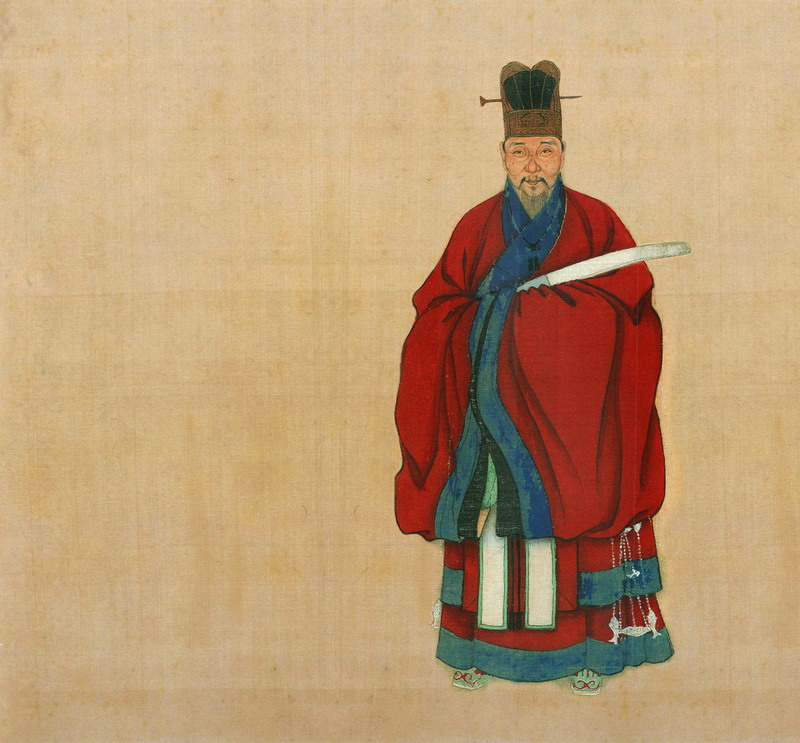 孙士美，字公粲。天启元年举人。知深州。清兵至，城破自杀。